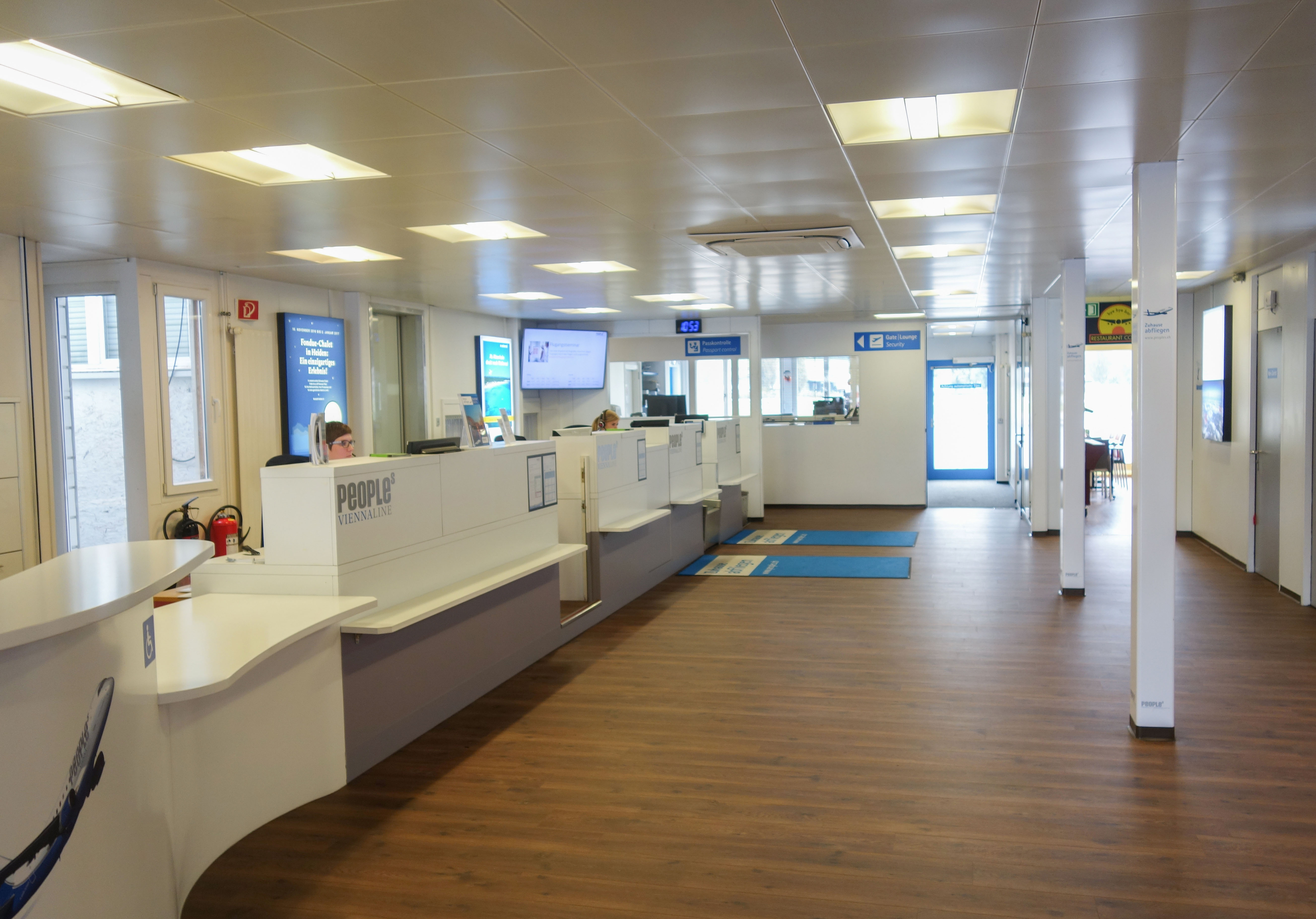 Terminal Flughafen St.Gallen-Altenrhein